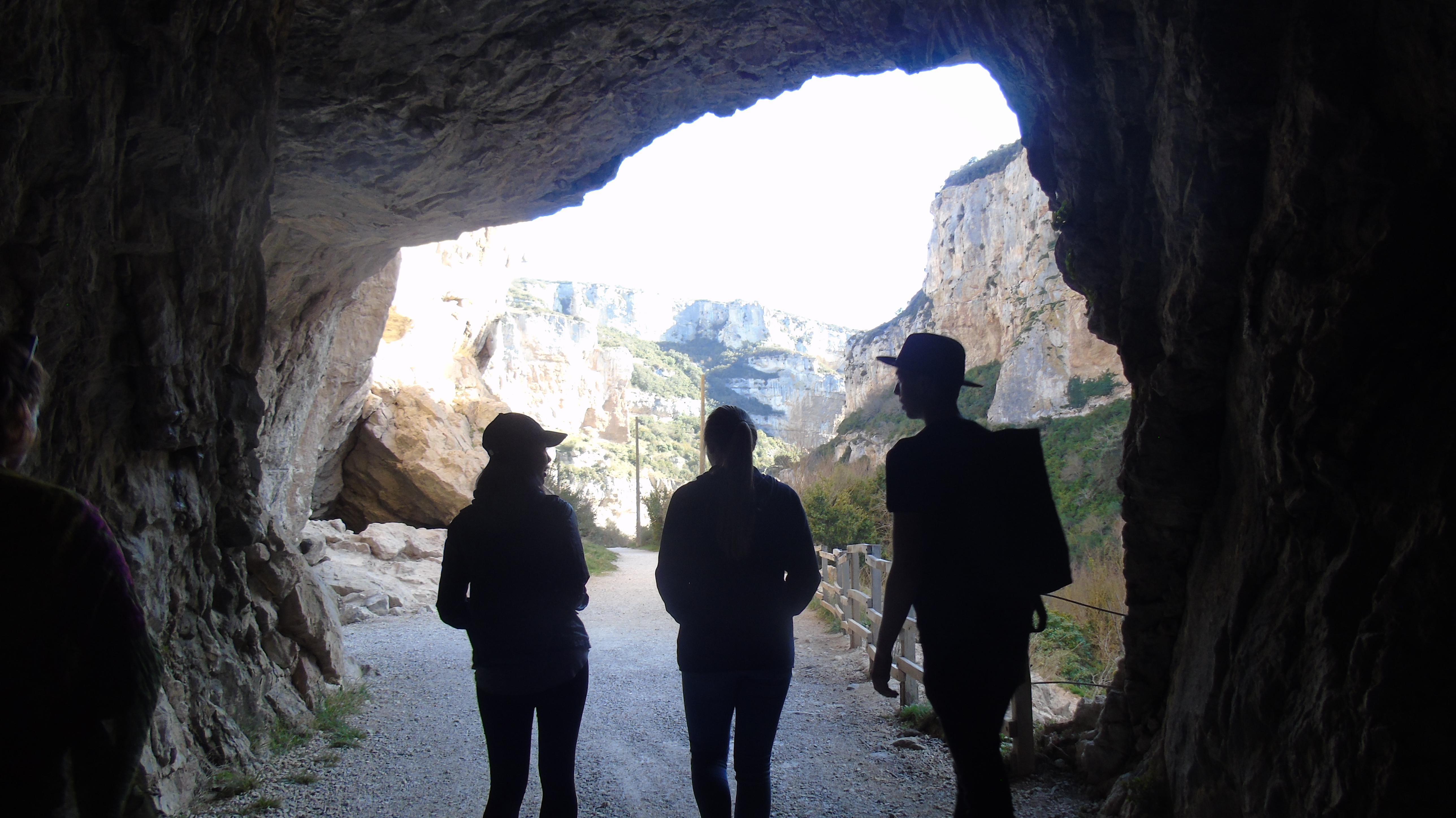 Tres personas van saliendo de un túnel.